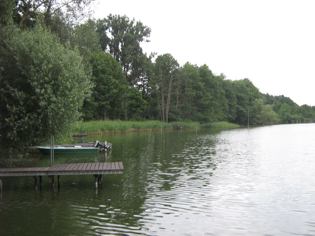 Der Netzener See bei Lehnin inBrandenburg (Germany)